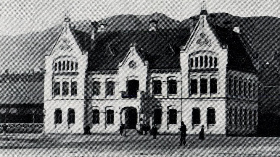 Bergens gamle stasjon ved Vossebanen (ark. Balthazar Lange). Revet 1976. Fra Just Broch: «Av Bergensbanens historie 1: Bergen–Voss» (1932).